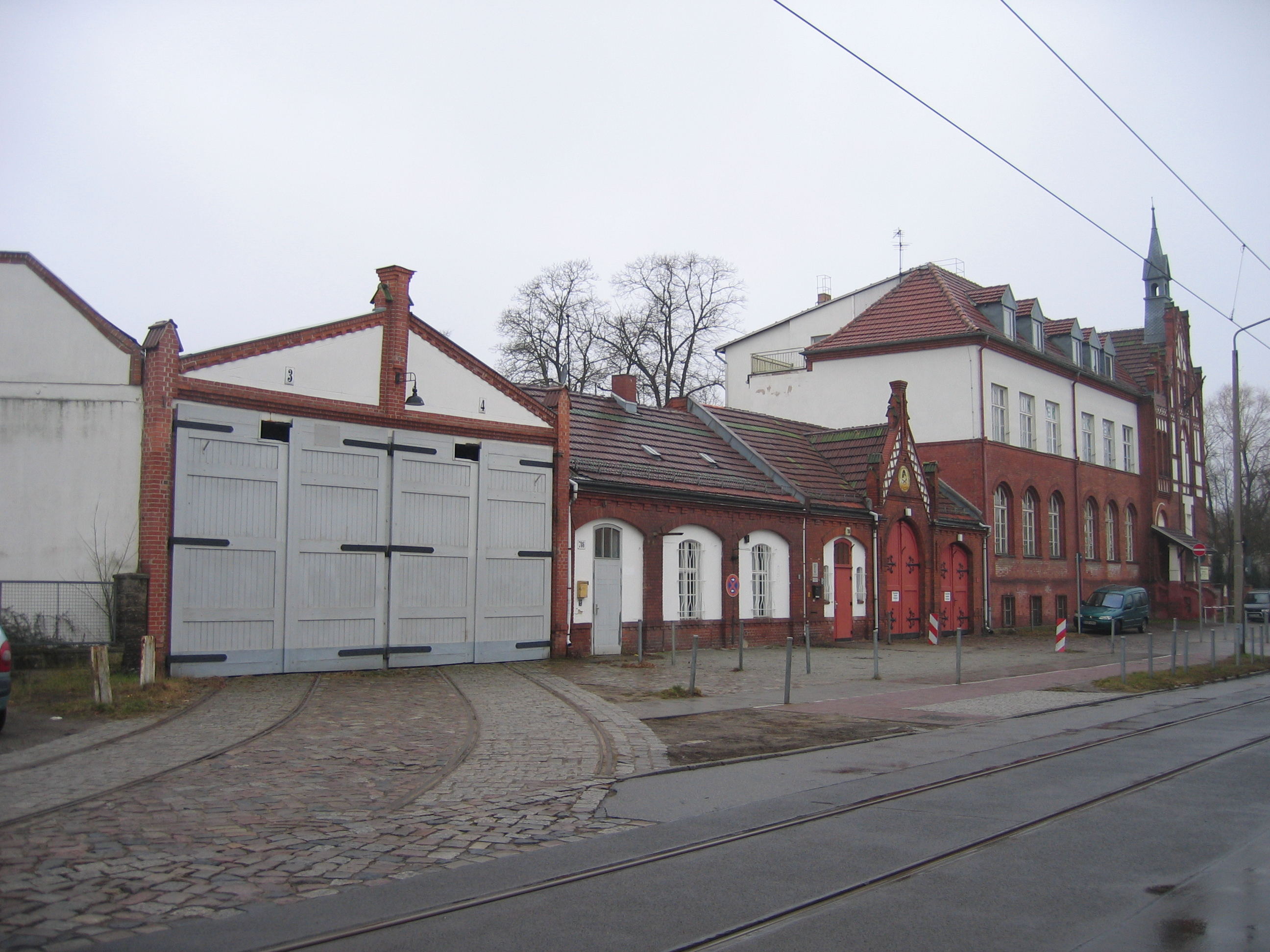 Ehemalige Wagenhalle der Uferbahn in Berlin-Schmöckwitz, inzwischen abgebrannt